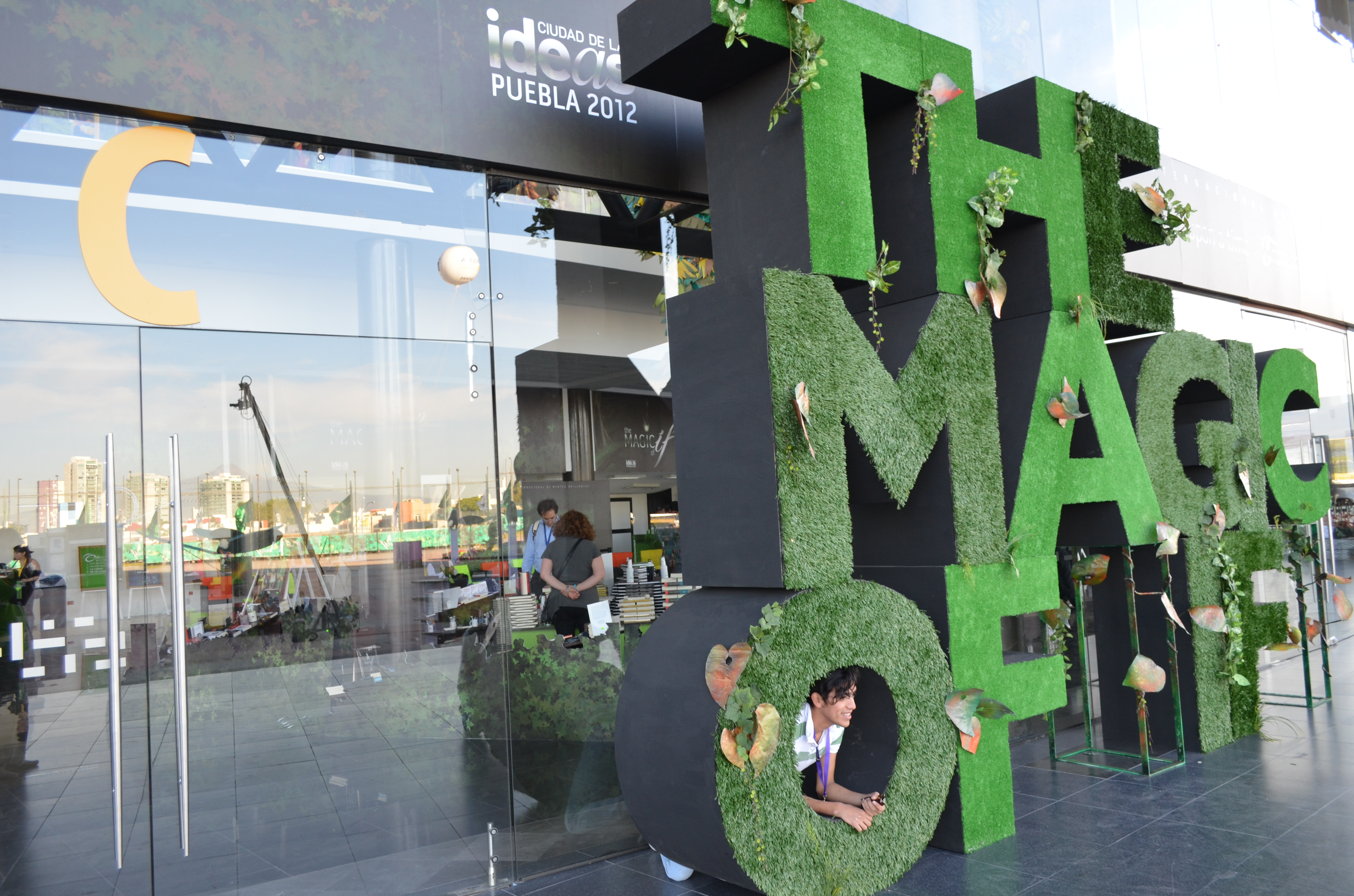 La Ciudad de las Ideas 2012. Magic of if